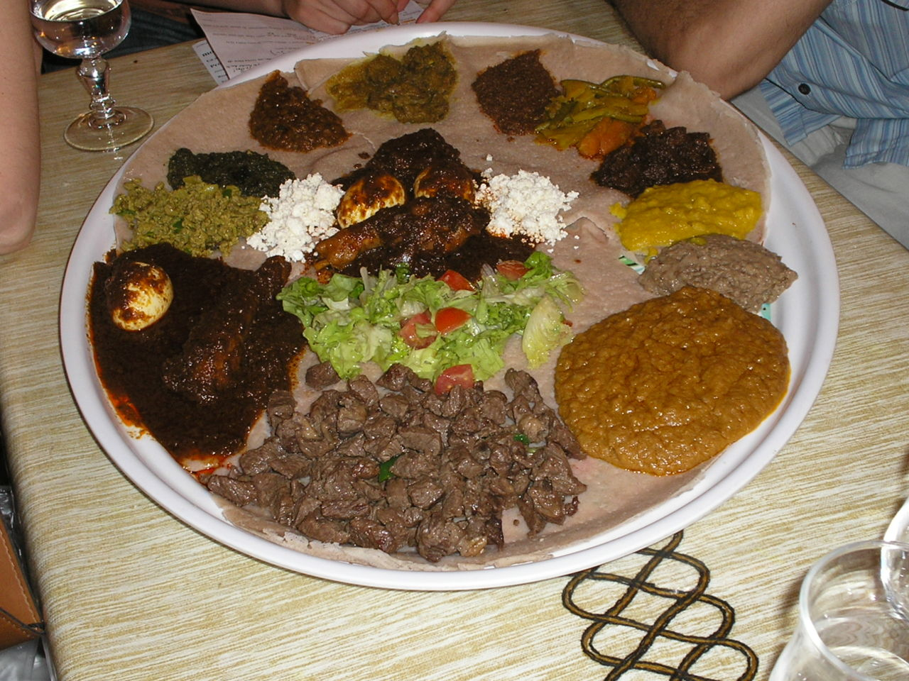 Plat de cuisine éthiopienne au Ménélik, restaurant éthiopien, 4 Rue Sauffroy, 75017 Paris, France.